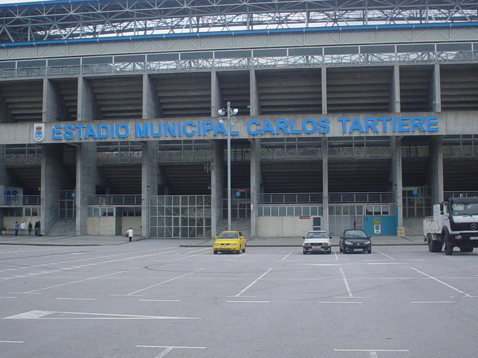 Estadio Carlos Tartiere en Oviedo, Asturias.